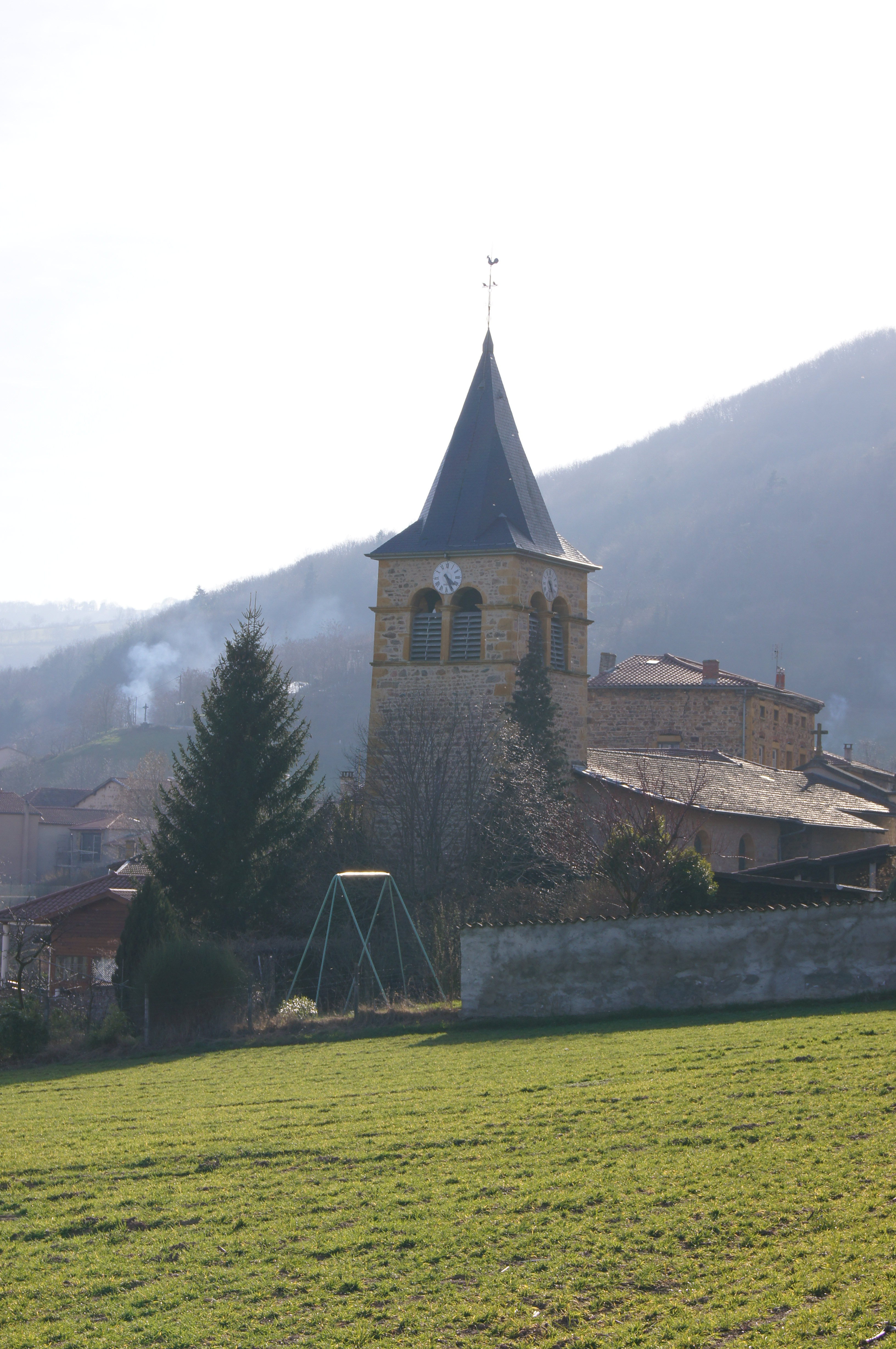 Eglise d'Ancy